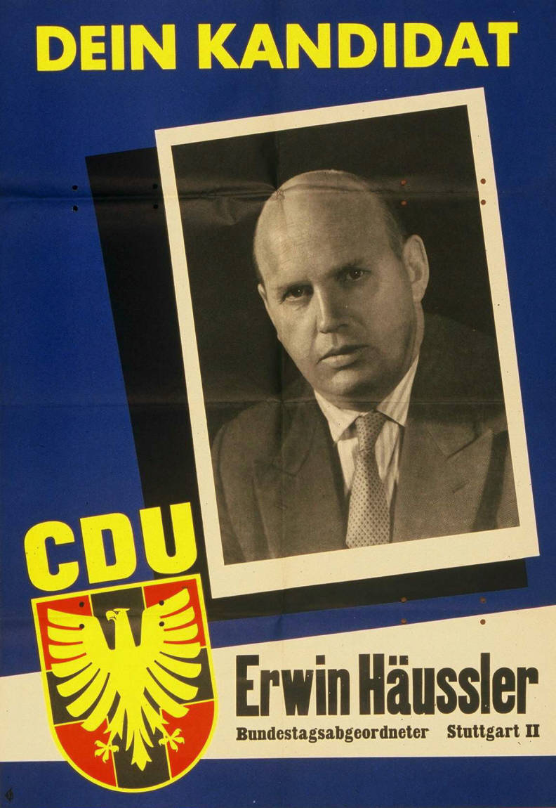 Dein Kandidat Erwin Häussler Bundestagsabgeordneter Stuttgart II Abbildung: Porträtfoto Plakatart: Kandidaten-/Personenplakat mit Porträt Auftraggeber: CDU-Bundesgeschäftsstelle Bonn Drucker_Druckart_Druckort: KVD Köln Objekt-Signatur: 10-001: 838 Bestand: Plakate zu Bundestagswahlen (10-001) GliederungBestand10-18: Plakate zu Bundestagswahlen (10-001) » Die 3. Bundestagswahl am 15. September 1957 » CDU » Mit Porträtfoto Lizenz: KAS/ACDP 10-001: 838 CC-BY-SA 3.0 DE